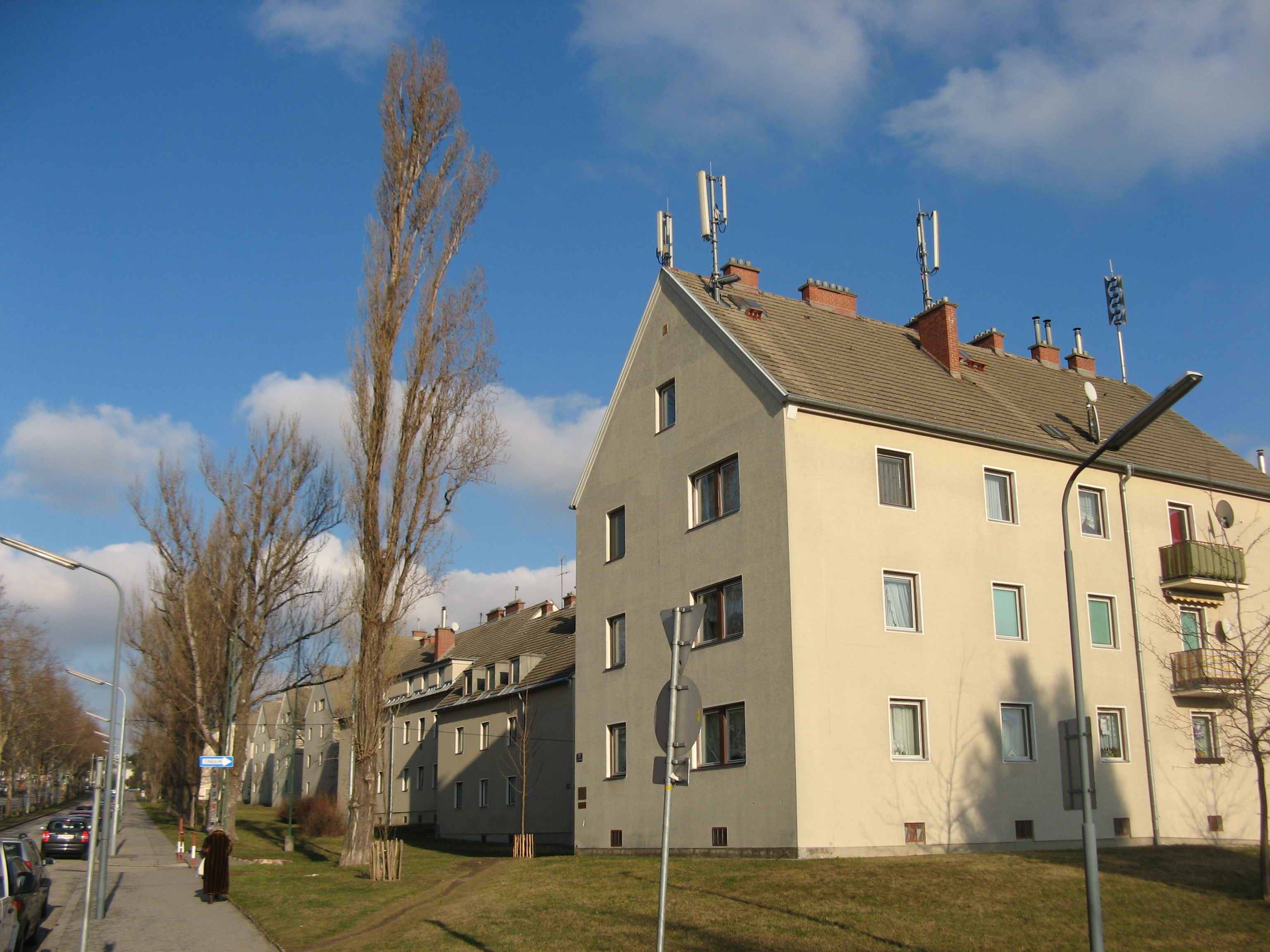 Wohnhausanlage (1953-56) von Hubert Matuschek und Anton Ubl, Laxenburger Straße 203-207, Wien-Favoriten